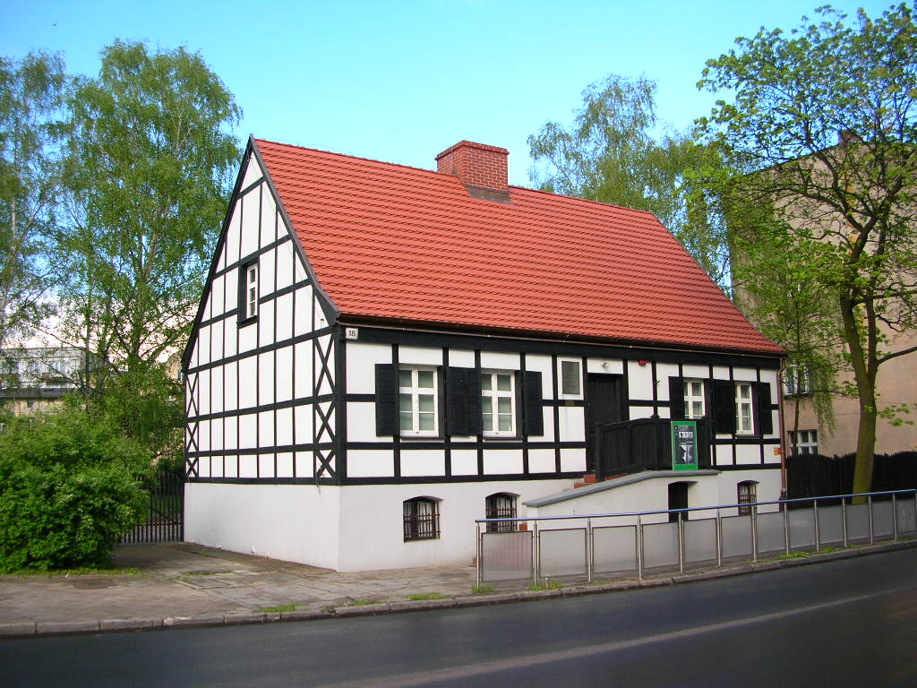 Piła - Dom Staszica (zabytek nr rejestr. A-121) Autor - Bartek Wawraszko